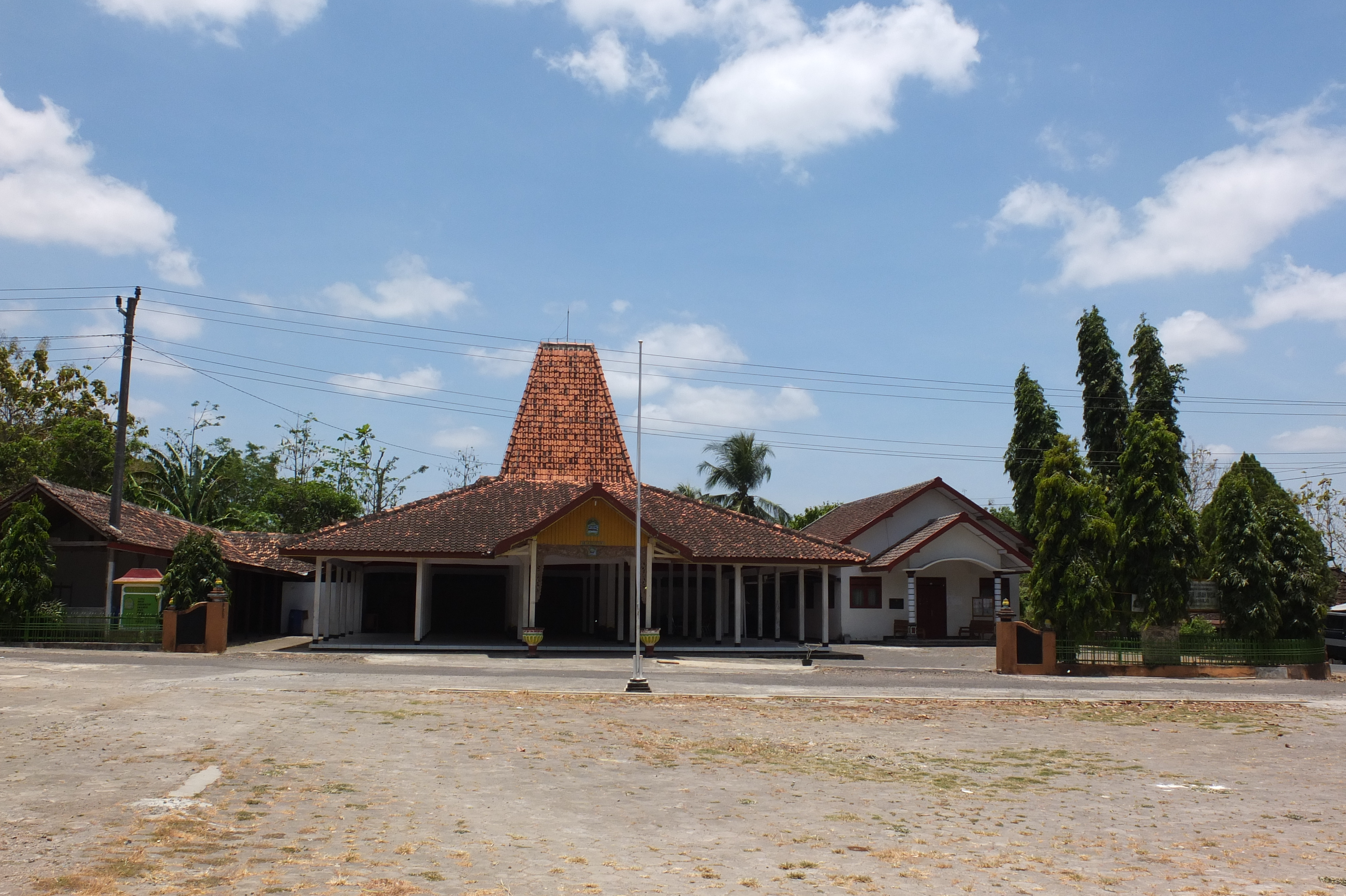 Balai Desa Bejiharjo.